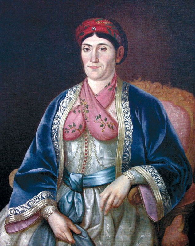 Knjeginja Ljubica Obrenovic